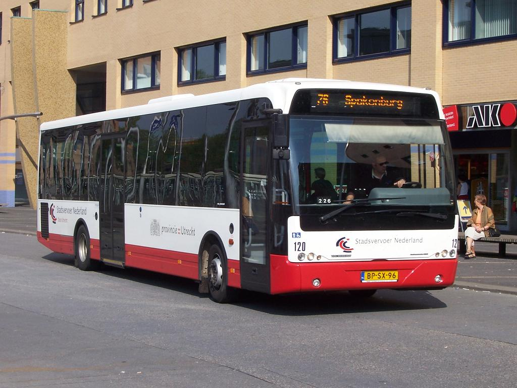 Bus van Stadsvervoer Nederland op het stationsplein van Amersfoort.